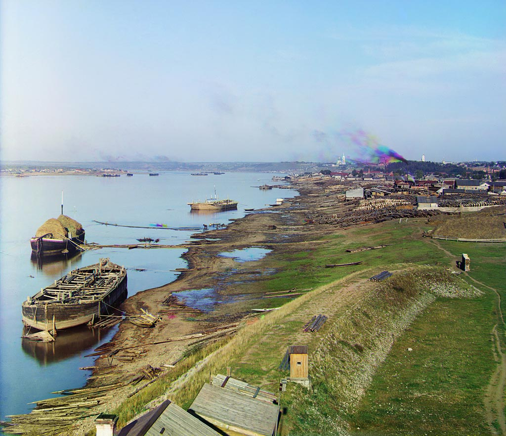 Вид на г. Пермь с железнодорожного моста через Каму